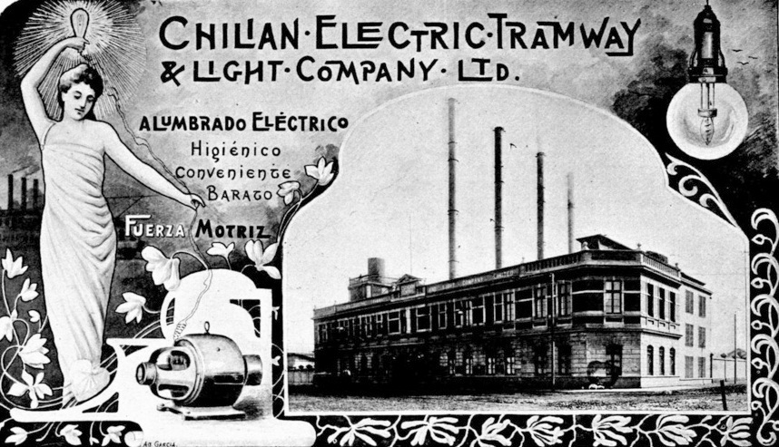 Imagen en Chile descripción física, política, social industrial y comercial de la República de Chile, por Carlos Tornero.1903